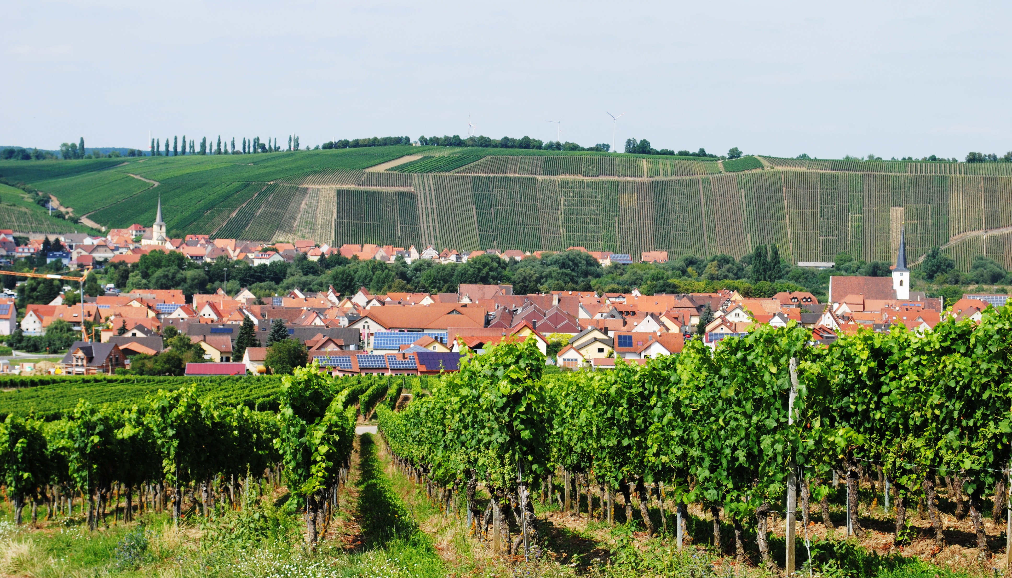 Nordheim, Escherndorf, vom Kreuzberg aus gesehen, Panorama